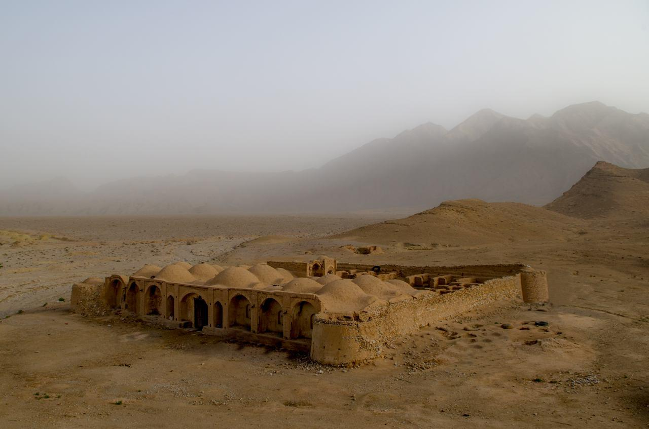 این کاروانسرا طبق بررسی اخیر میراث فرهنگی متعلق به دوره قاجار است و آنچه در مورد داستان ساخت آن توسط شاه عباس صفوی گفته می‌شود نمی‌تواند صحیح باشد